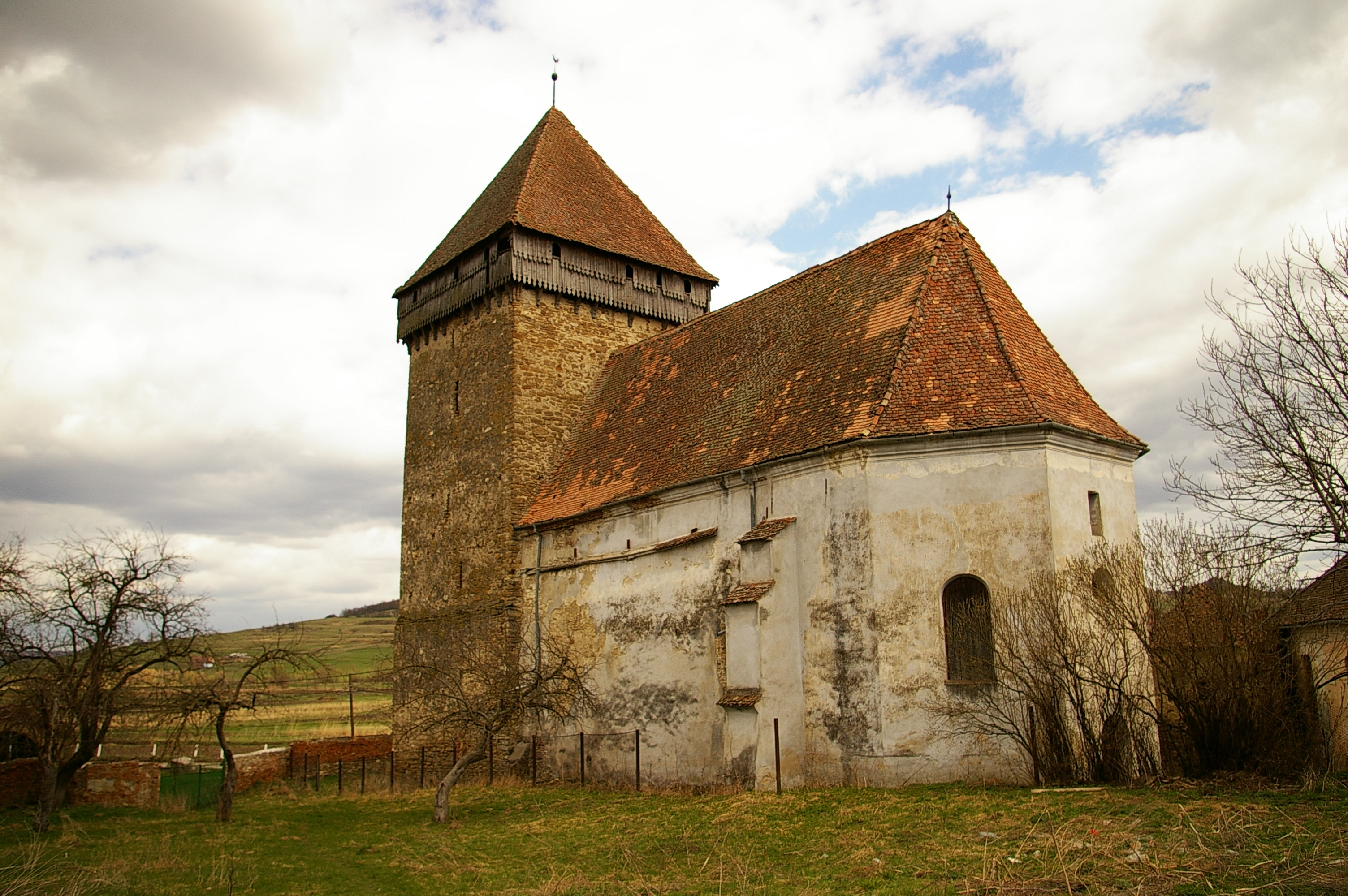 Biserica evanghelică fortificată, sat Netuș; comuna Iacobeni 01